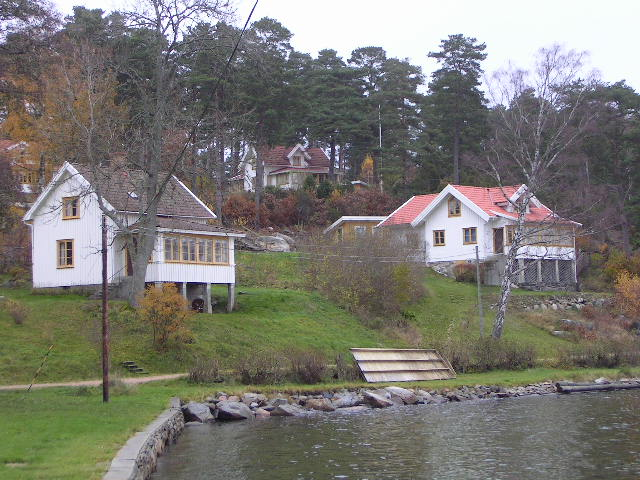 Några hus på Stillingsön, målade i områdets gemensamma färger.